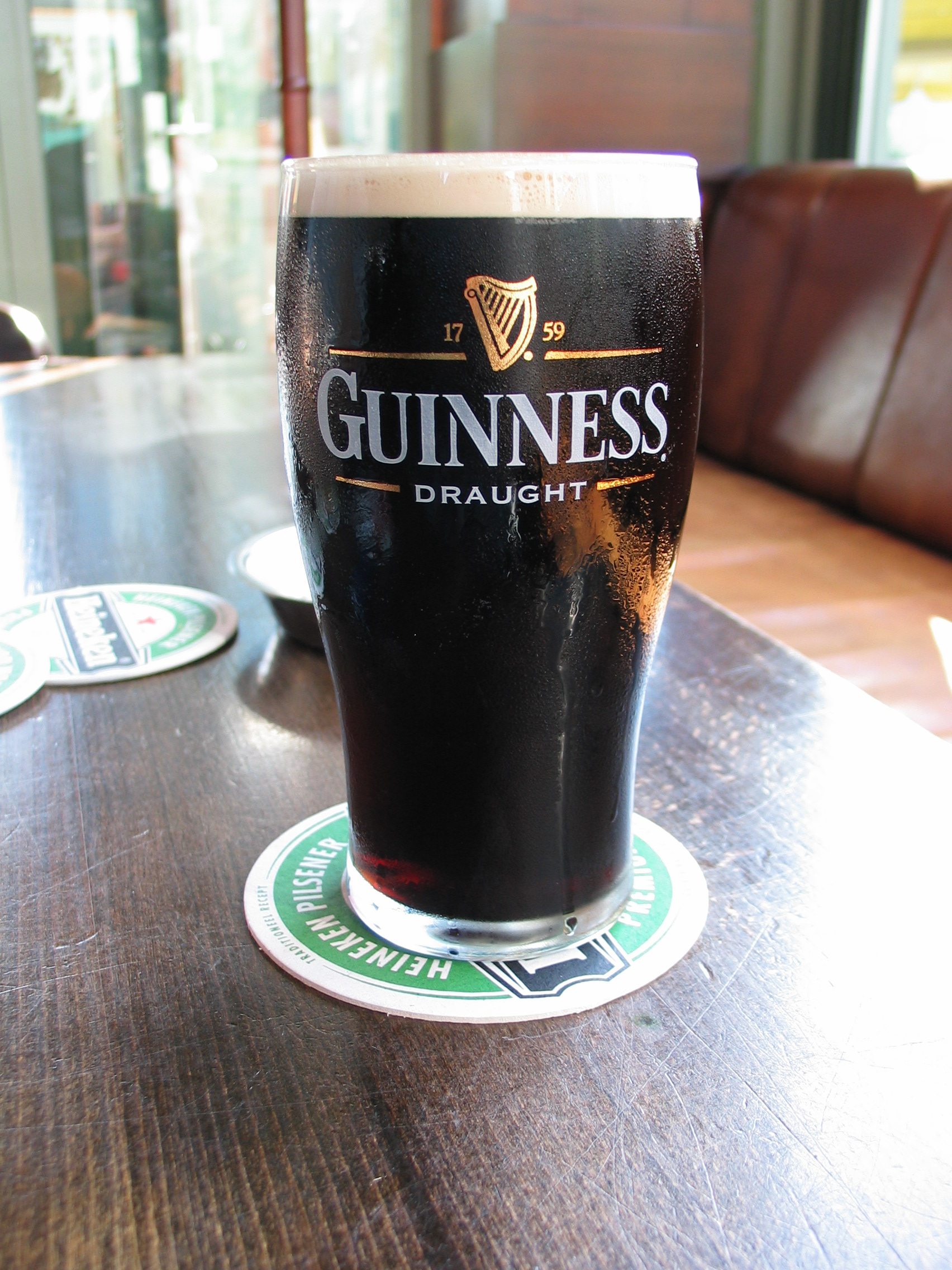 Glas Guinness bier. De foto is 30 juli 2005 gemaakt door H. de Vegt.